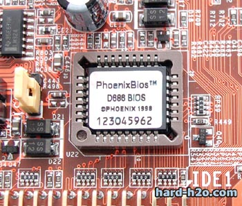 placas.jpg